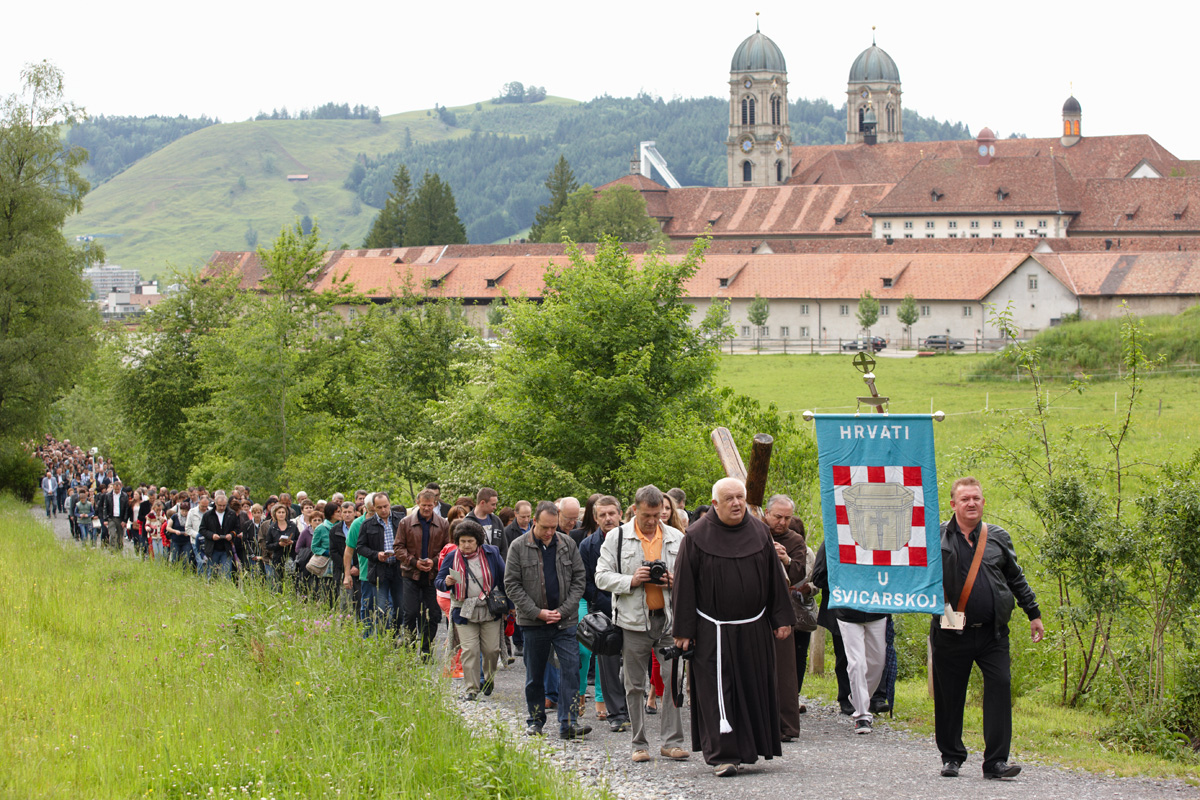 Svake godine početkom lipnja Hrvati u Švicarskoj hodočaste u svetište Einsiedeln.